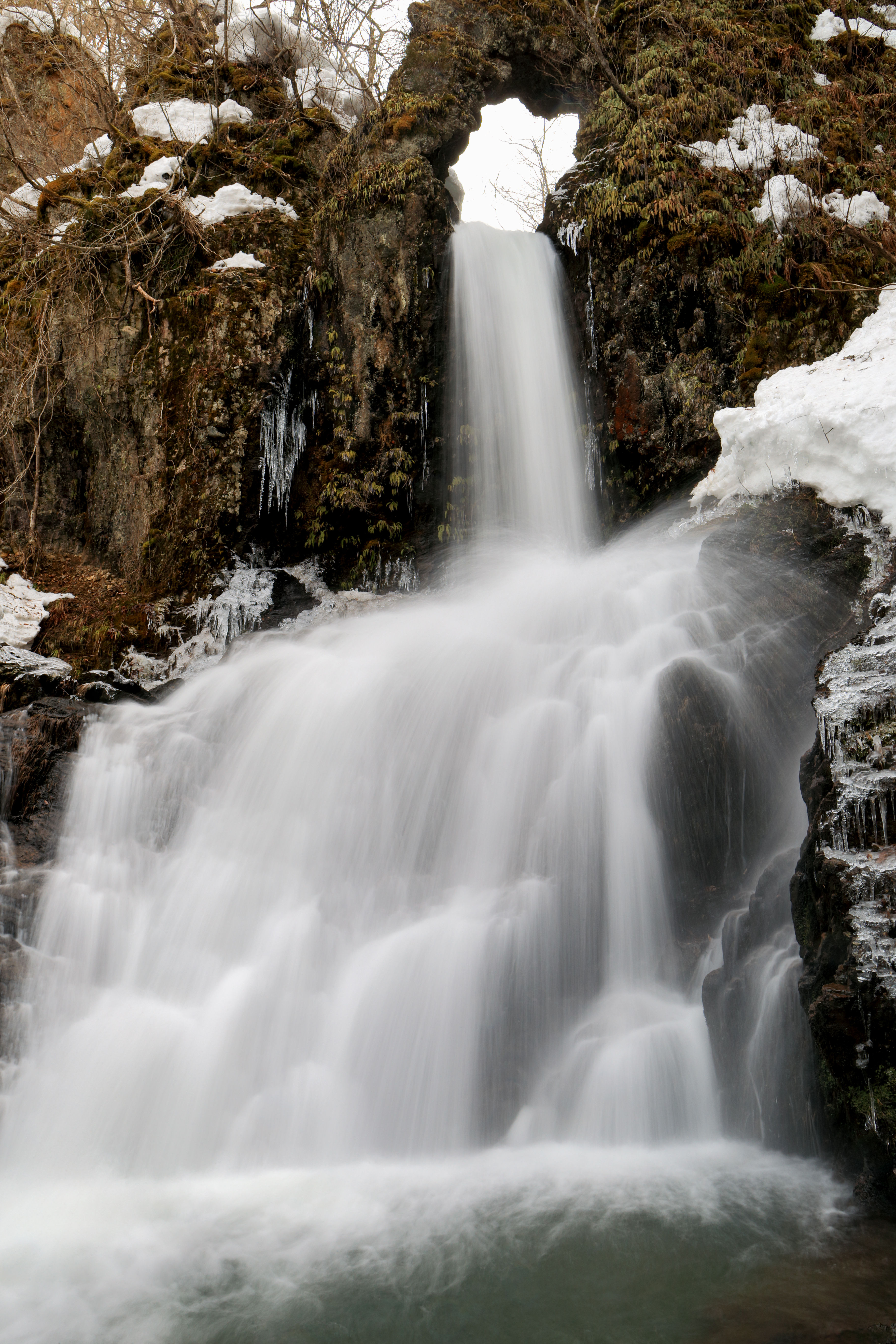 吉野川の源流付近にある、くぐり滝